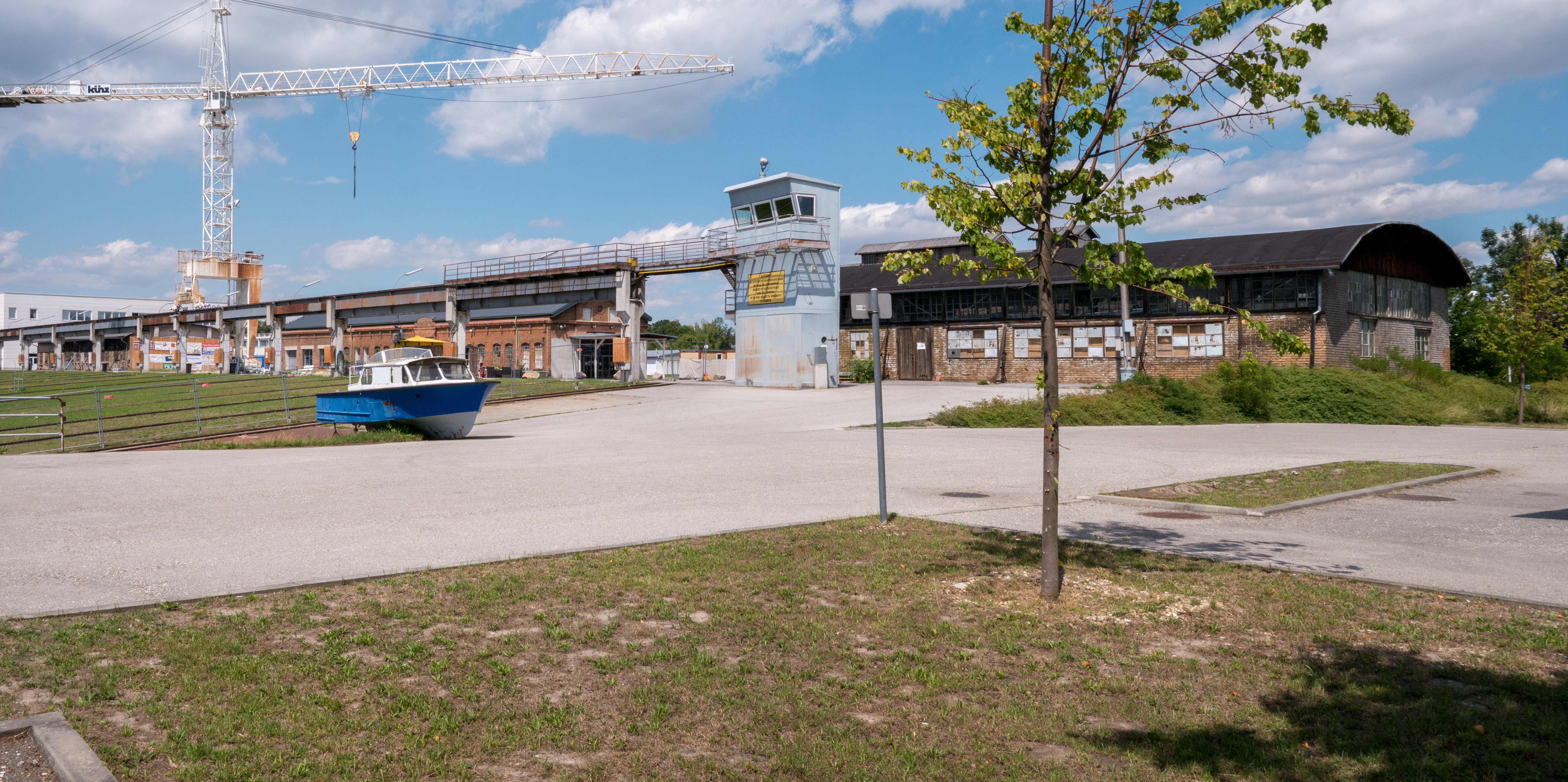 Ehem. Schiffswerft Korneuburg